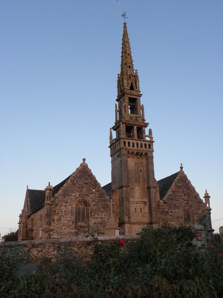 Façade occidentale de l'église saint-Éguiner de Loc-Éguiner (29). .